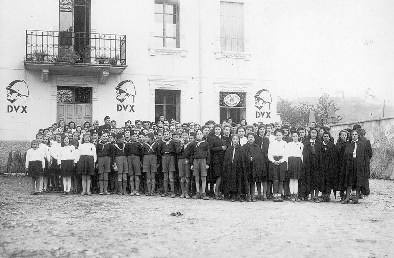 Marano (provincia di Verona), casa del fascio, in una foto d'epoca